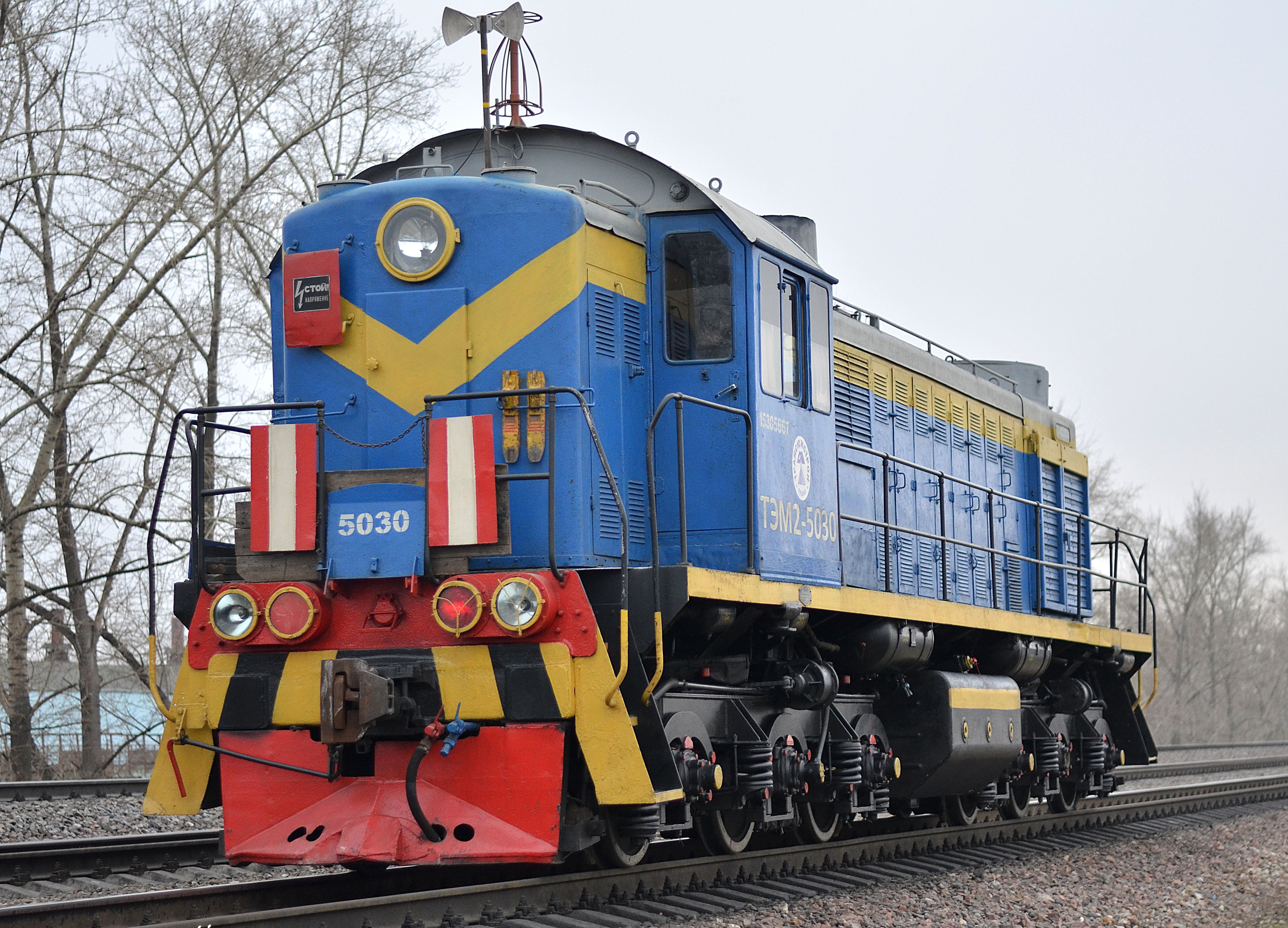 Можно увидеть здесь : You can see here